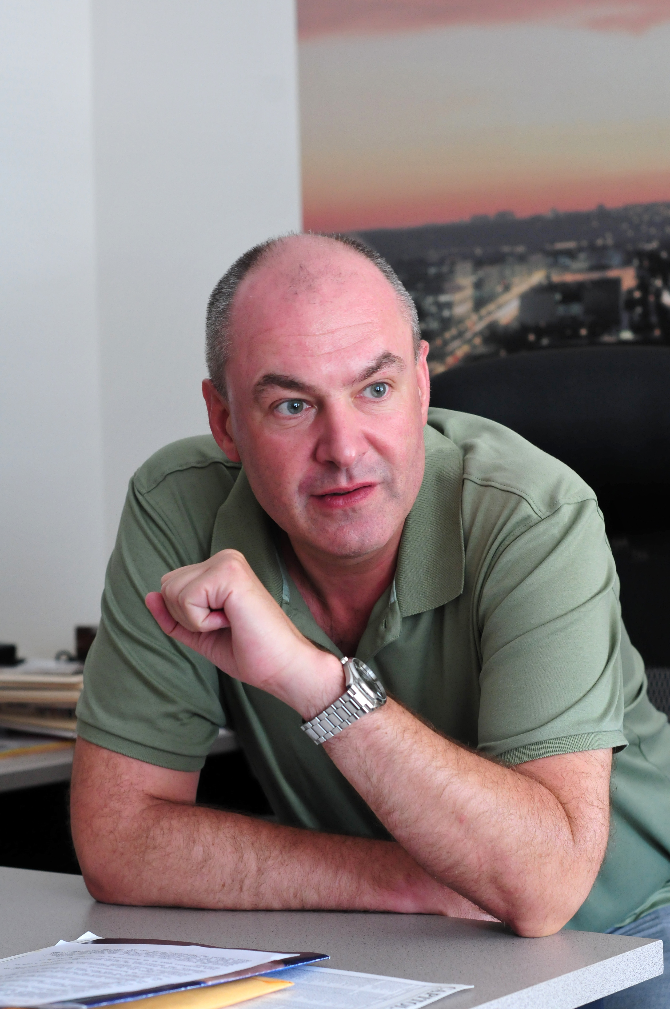 Mag. Wolfgang Geier, ORF Washington D.C. 2012 The making of this work was supported by Wikimedia Austria. For other files made with the support of Wikimedia Austria, please see the category Supported by Wikimedia Österreich.